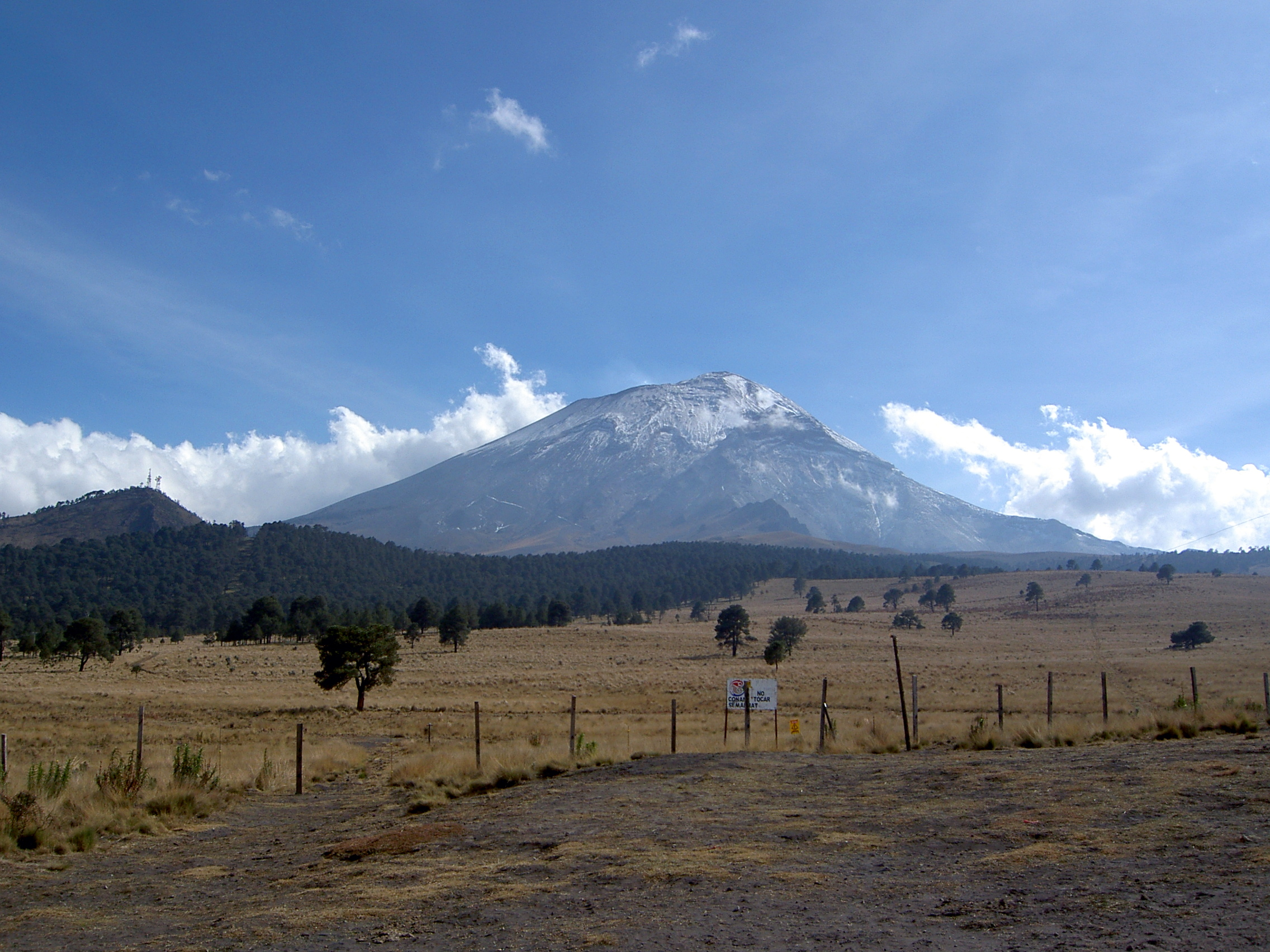 Popocatepetl visto desde el paso de cortes.